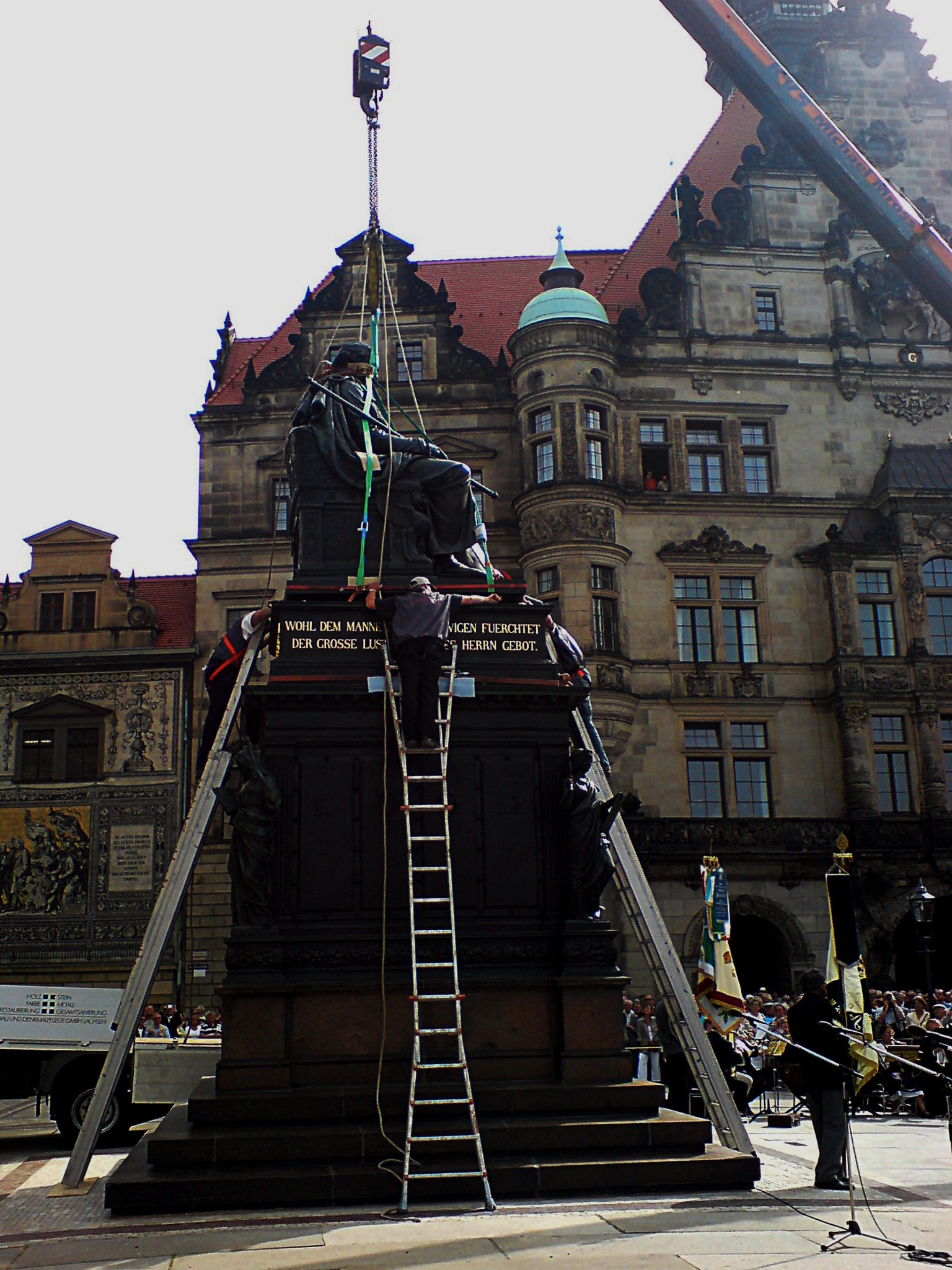 Aufsetzen der Skulptur von Friedrich August I. (Rietschel) auf den Denkmalssockel, Schlossplatz Dresden, 29.5.2008